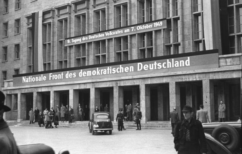 ADN-ZB/Donath, 7.10.1949 Berlin: Gründung der Deutschen Demokratischen Republik am 7.10.1949 Im Gebäude der DWK (Deutschen Wirtschaftskommission) in der Leipziger Straße fand am 7.10.1949 die 9. Tagung des Deutschen Volksrates statt, auf der das Manifest der Nationalen Front des demokratischen Deutschland verkündet wurde. Der Deutsche Volksrat konstituierte sich zur Provisorischen Volkskammer der Deutschen Demokratischen Republik. Das Gebäude der DWK in der Leipziger Straße am Tag der Gründung der DDR. [Berlin.- Gebäude der Deutschen Wirtschaftskommission (ehemals Reichsluftfahrtministerium, später Haus der Ministerien)]